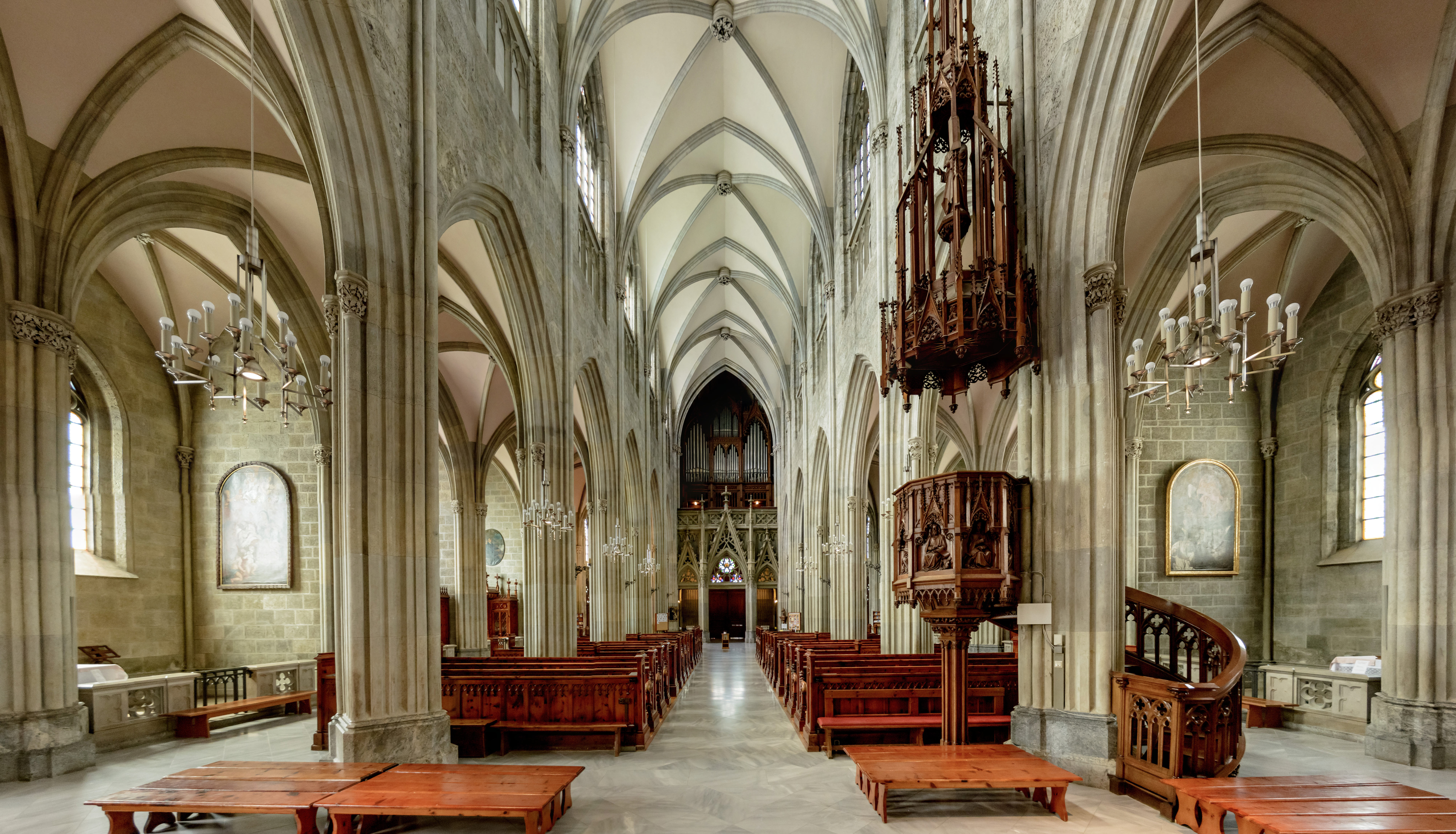 Stiftskirche Admont Dieses Bild wurde anlässlich des österreichischen Tags des Denkmals 2015 in der Steiermark eingereicht.